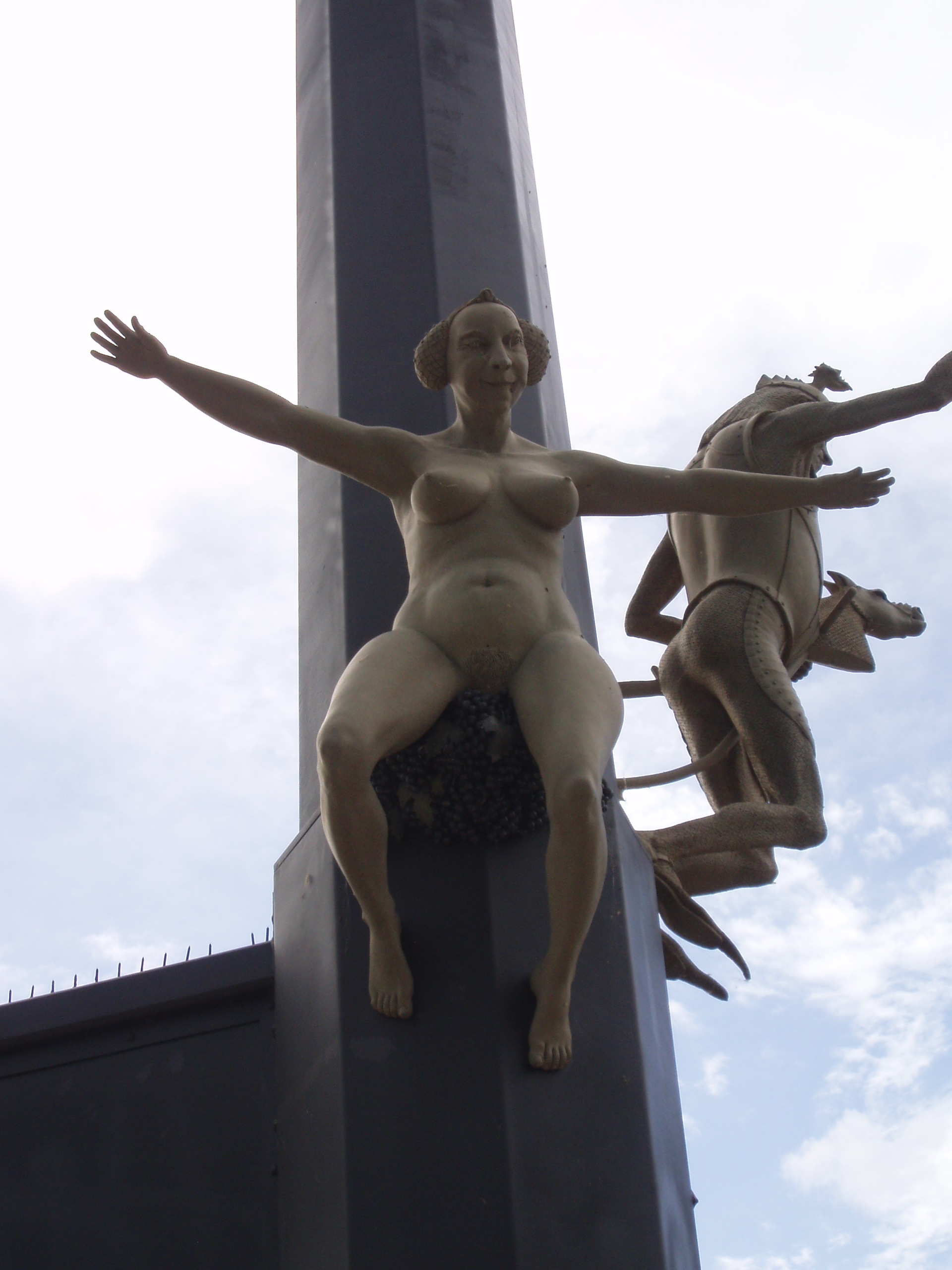 Wendelgard von Halten, Figur an der Magischen Säule von Peter Lenk in Meersburg